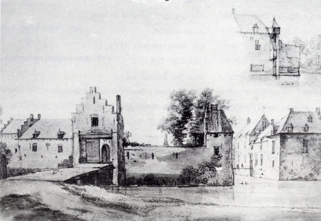 Huis te Meeuwen naar oude tekening